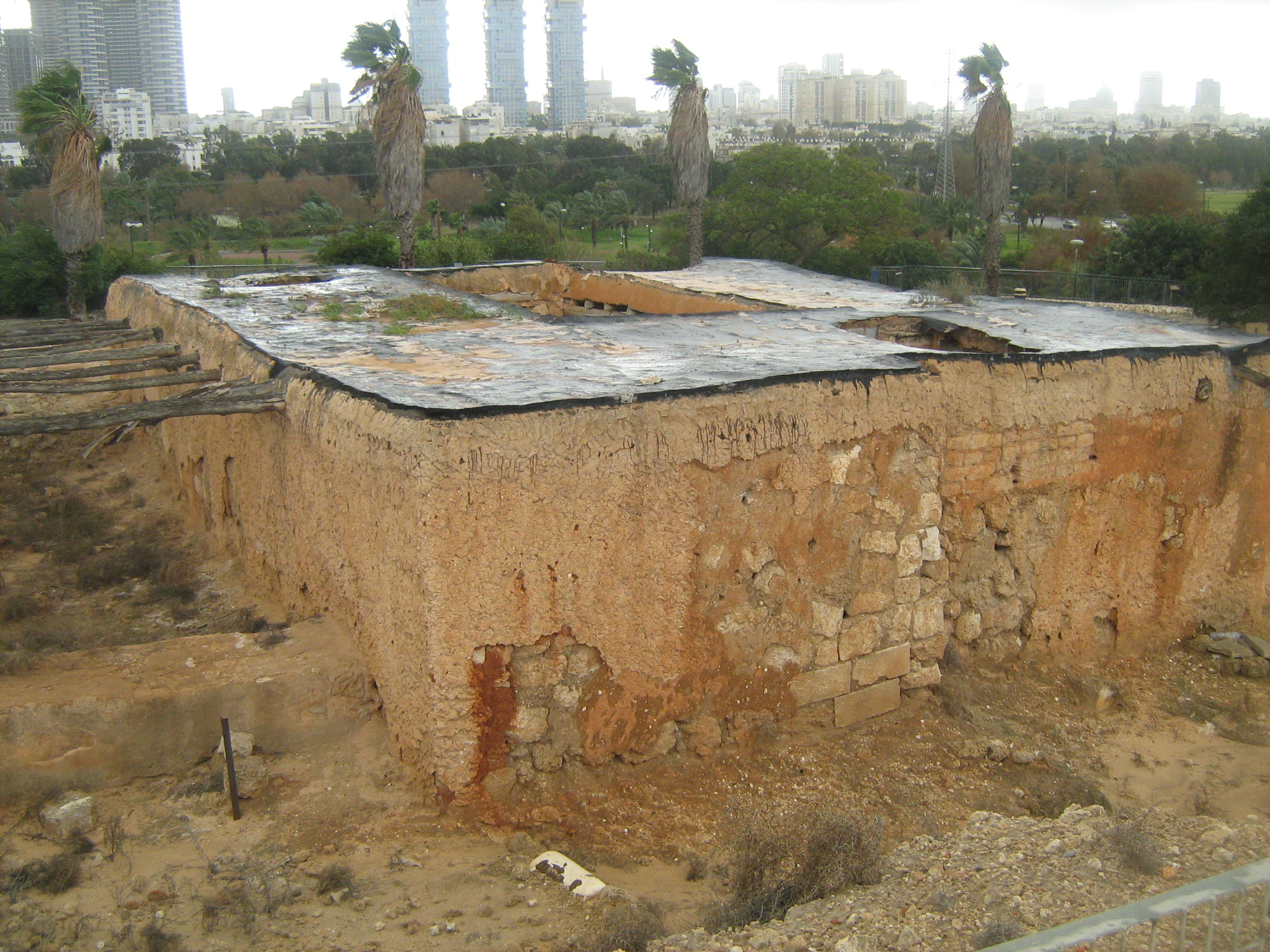 תל קסילה